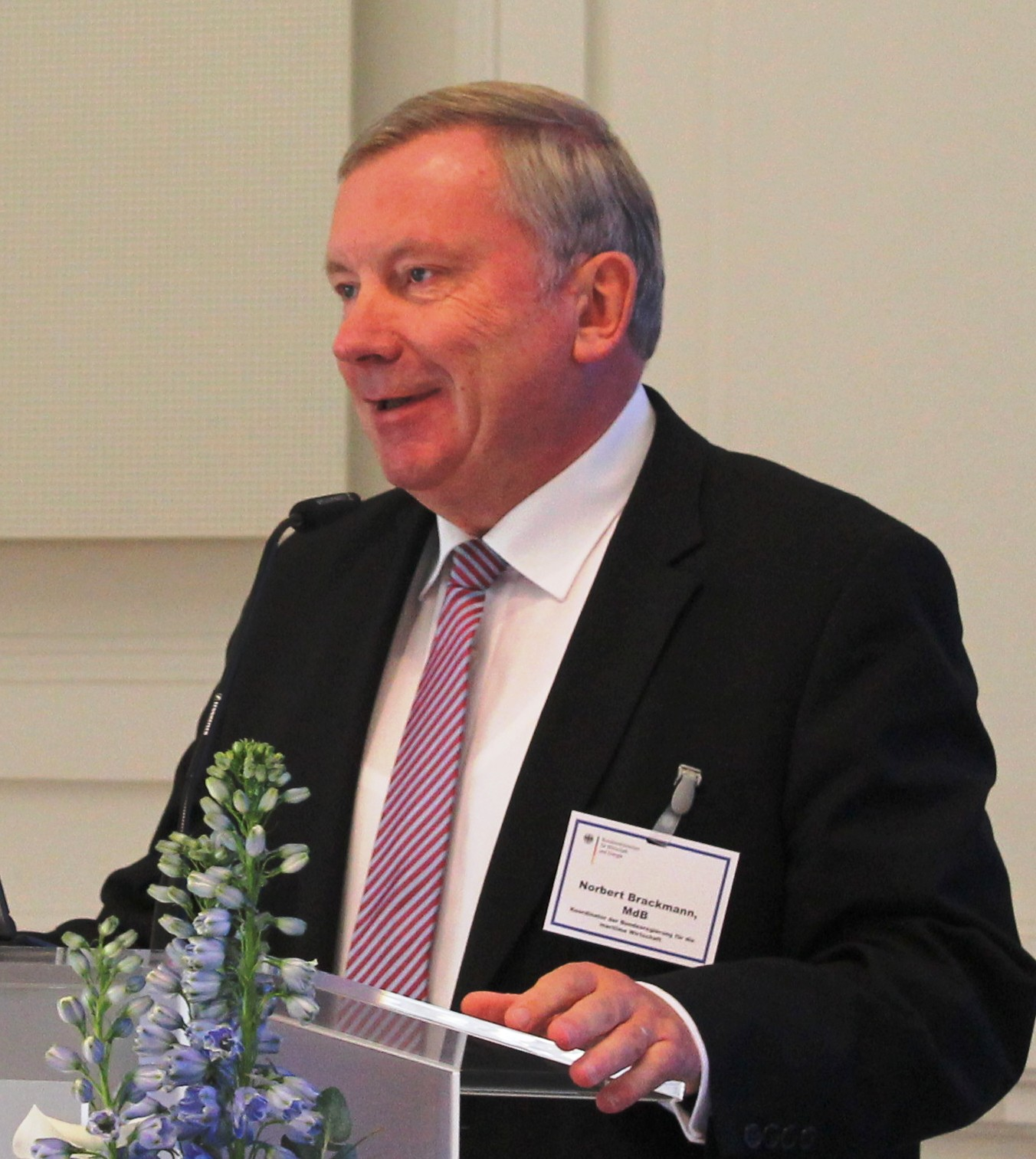 Maritimer Koordinator Norbert Brackmann in Berlin